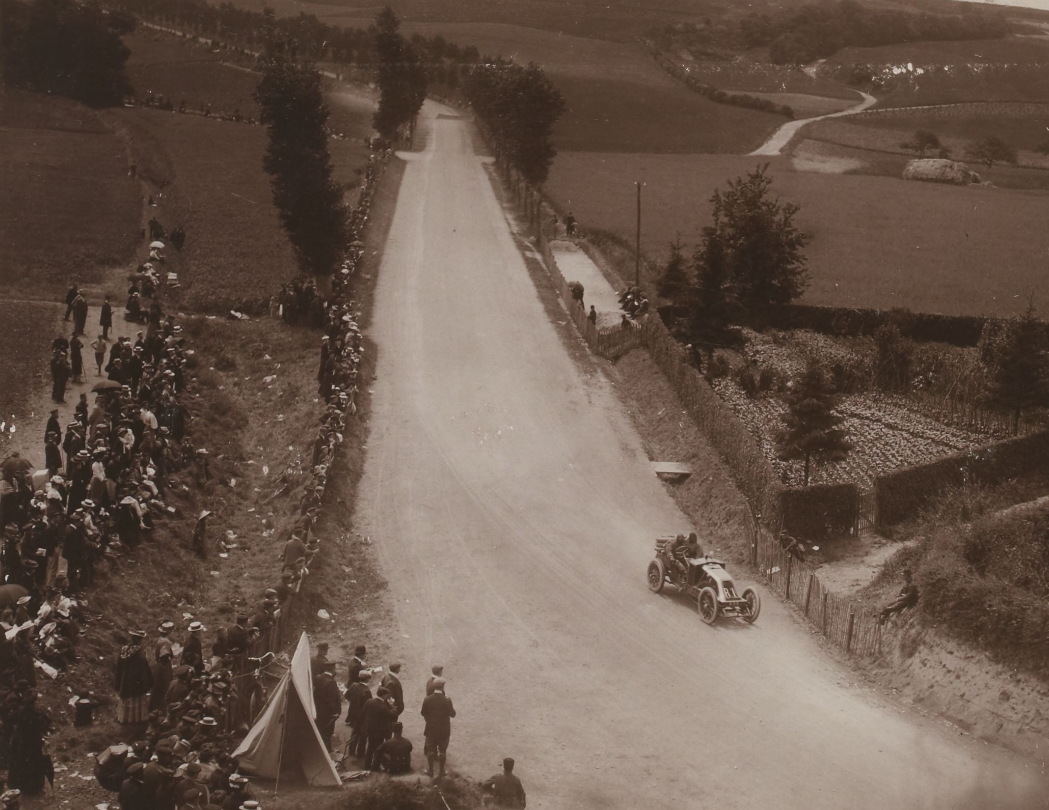 [Collection Jules Beau. Photographie sportive] : T. 34. AnnÃ©es 1907 et 1908 / Jules Beau : F. 9. [Grand Prix de l\' A. C. F. [Automobile Club de France], Coupe de la Commission sportive, 2 juillet 1907]